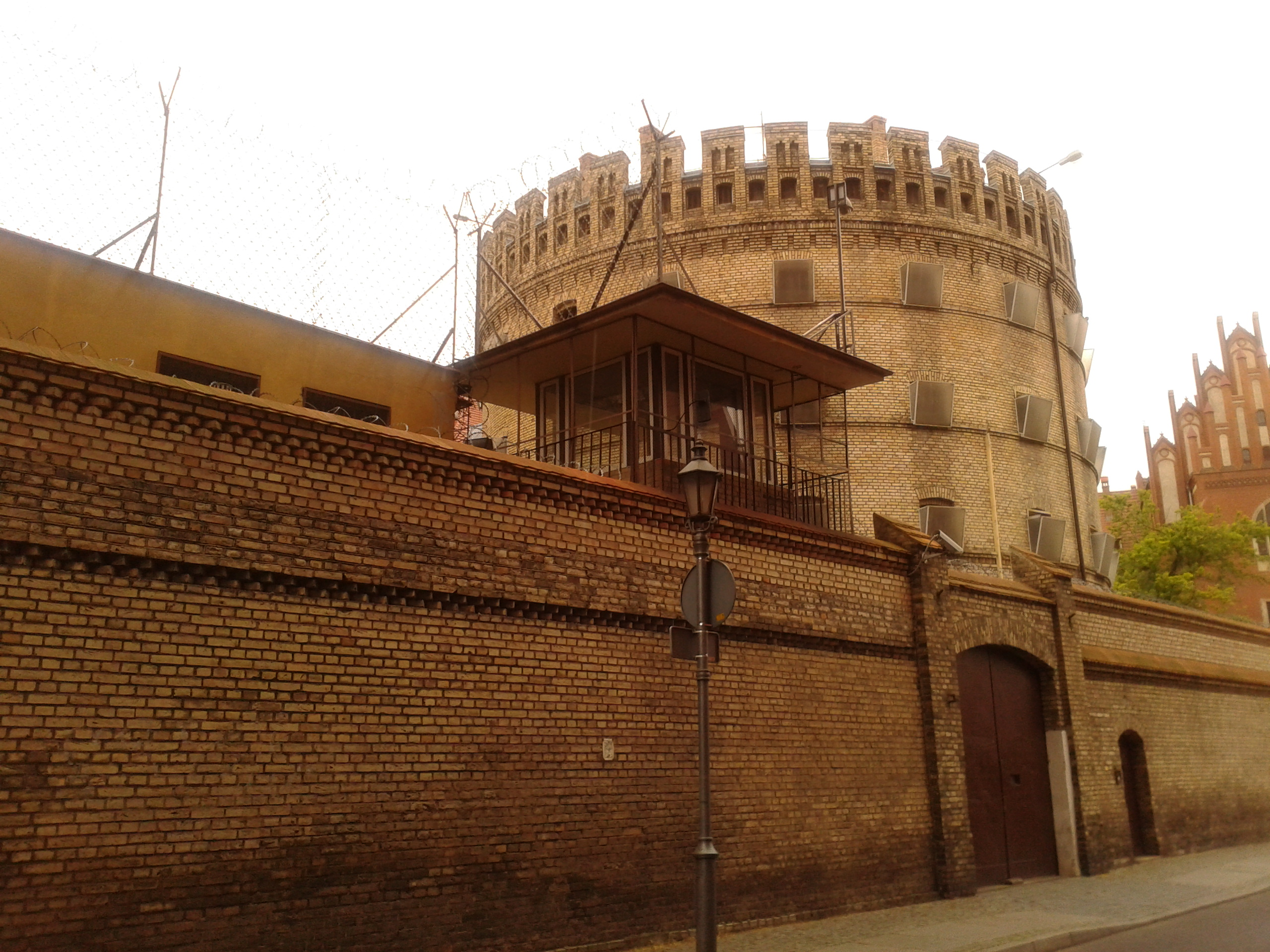 Areszt Śledczy pod adresem Piekary 53 w Toruniu (nazywany też okrąglakiem) Areszt Śledczy w Toruniu na